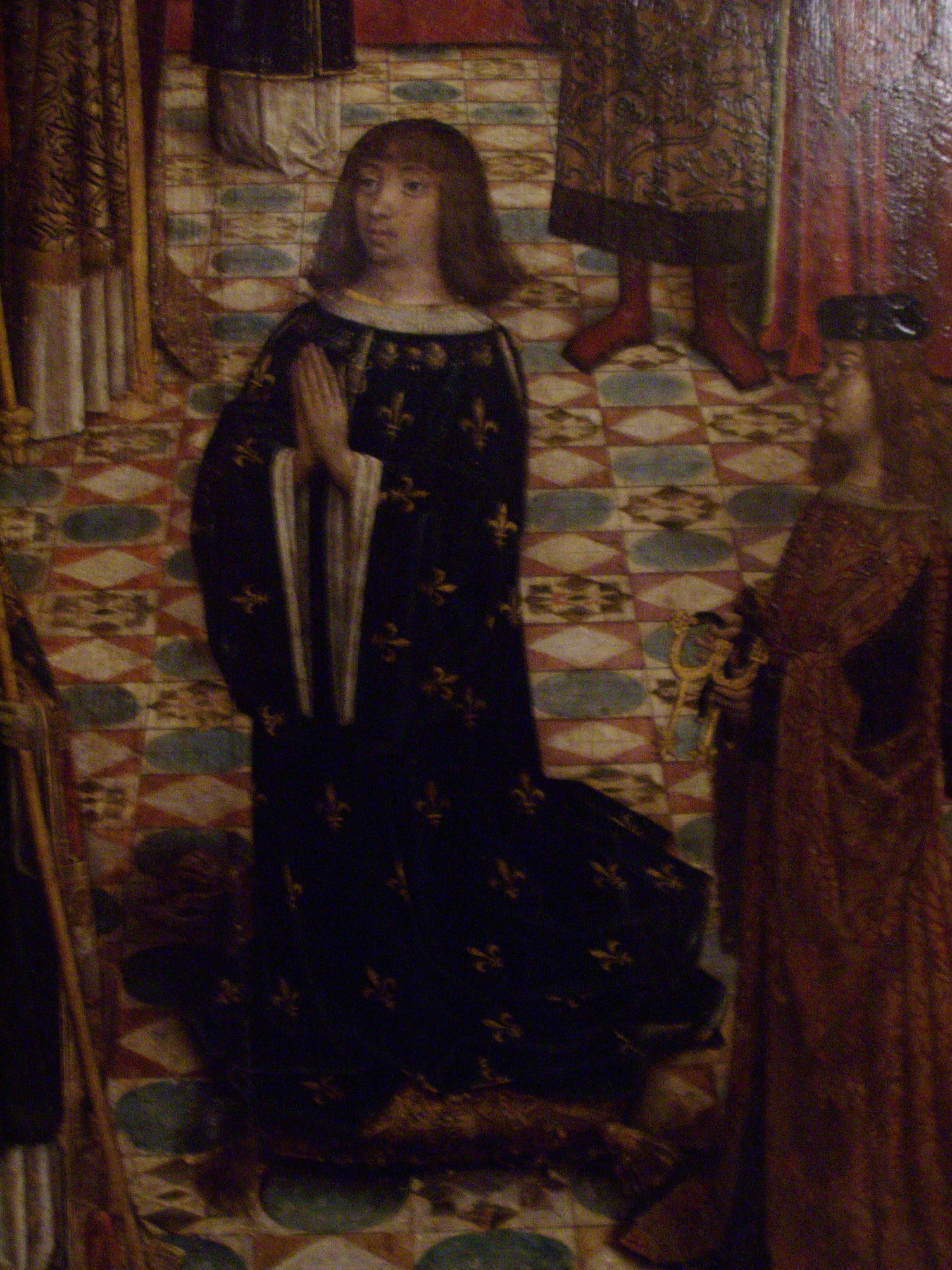 détail du Sacre de David et sacre Louis XII, provenant de la Cathédrale Notre-Dame d'Amiens, 1501, conservé au musée de Cluny